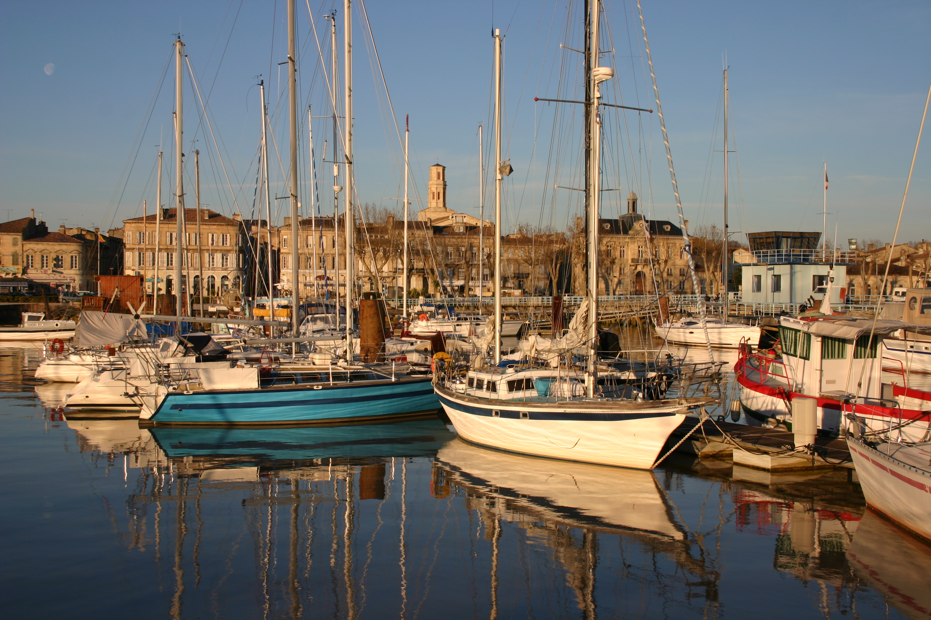 Crédit Photo F. Fatin